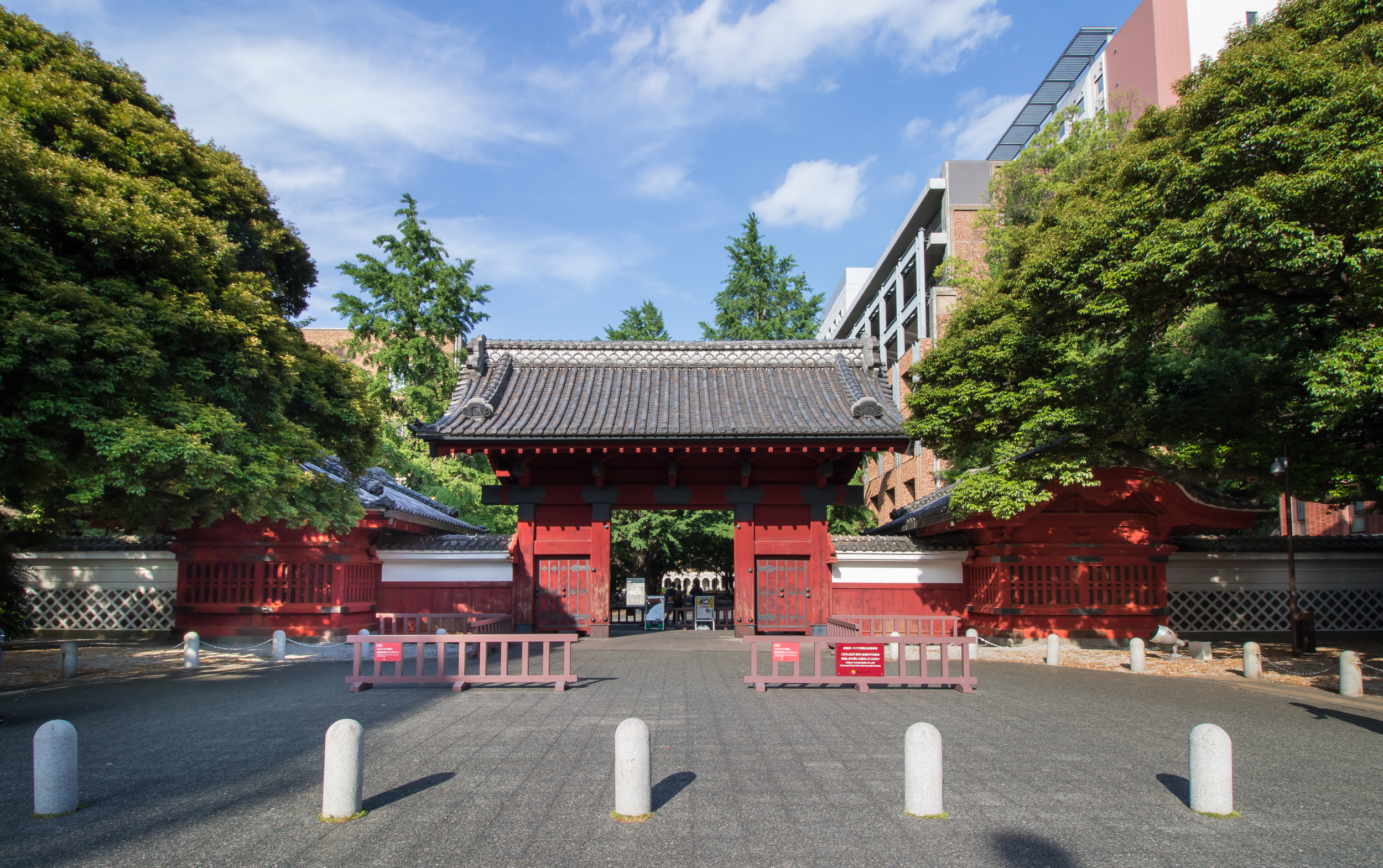 東京大学、赤門。